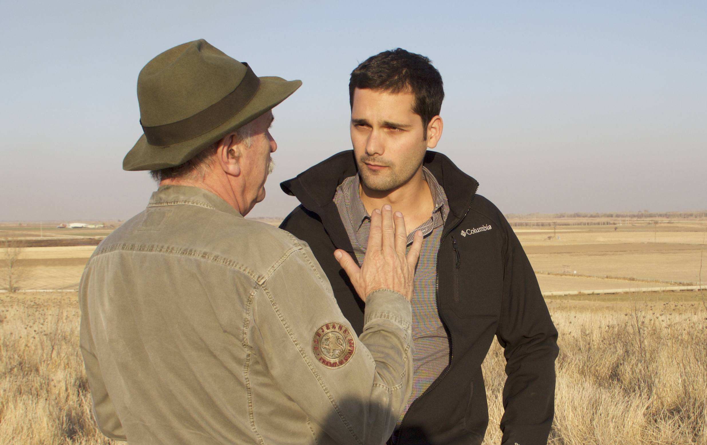 Luis Quevedo junto a Eudald Carbonell en Çatalhöyuk, Turquía, durante el rodaje del documental 'Buscando el futuro'.